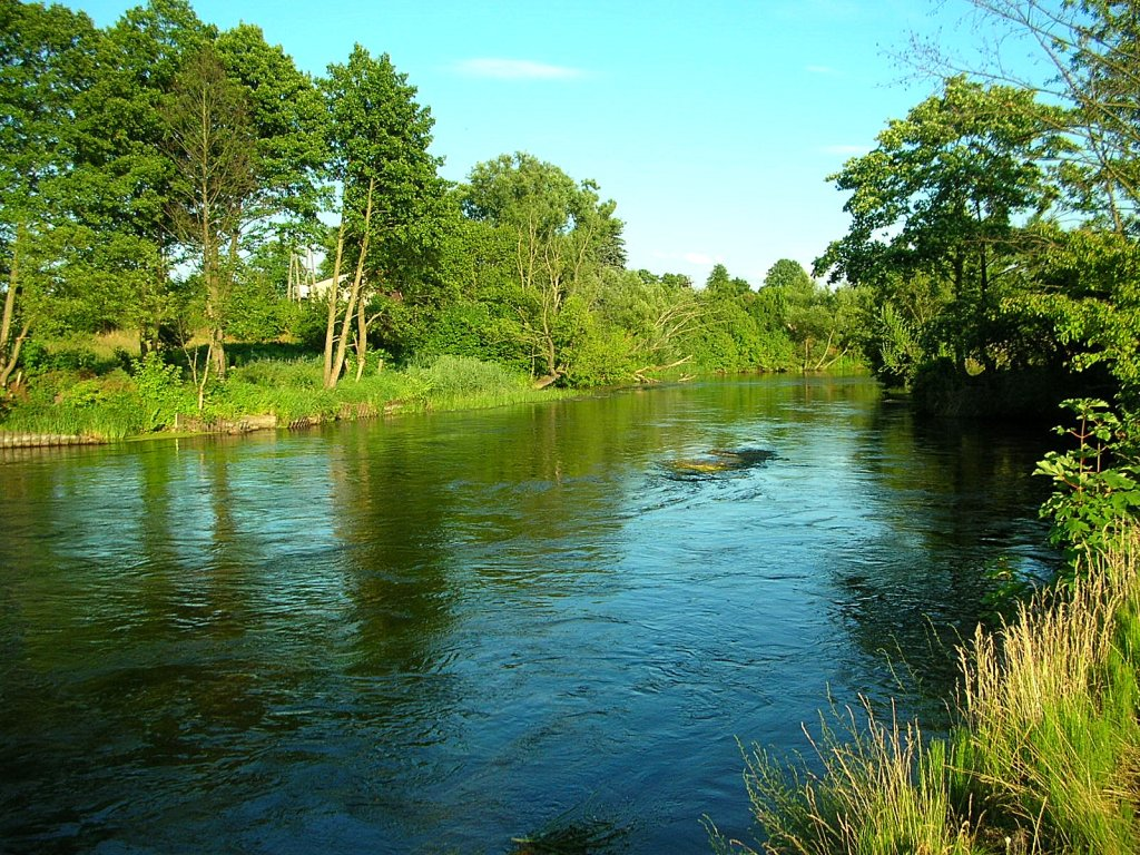 Brda na os. Czyżkówko w Bydgoszczy